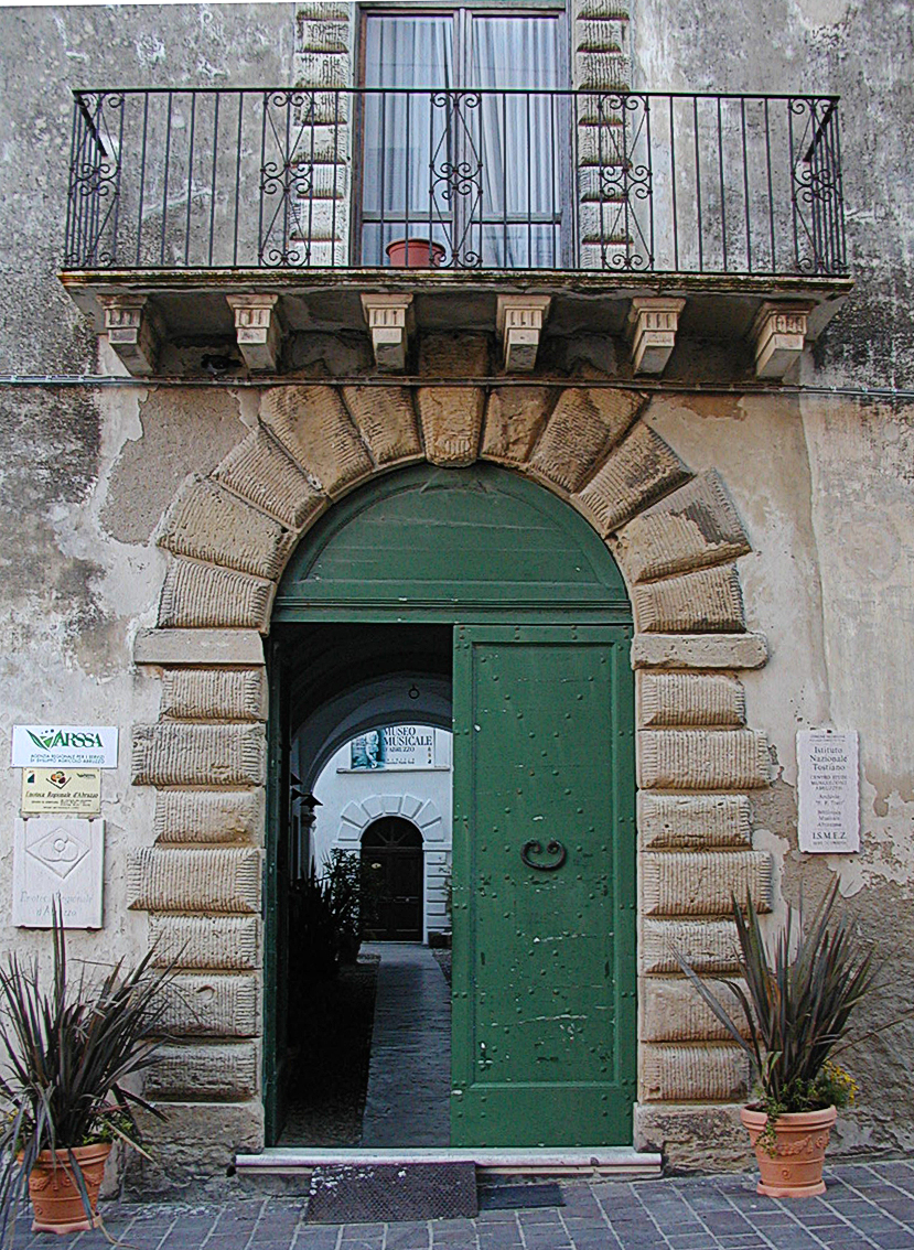 Ortona